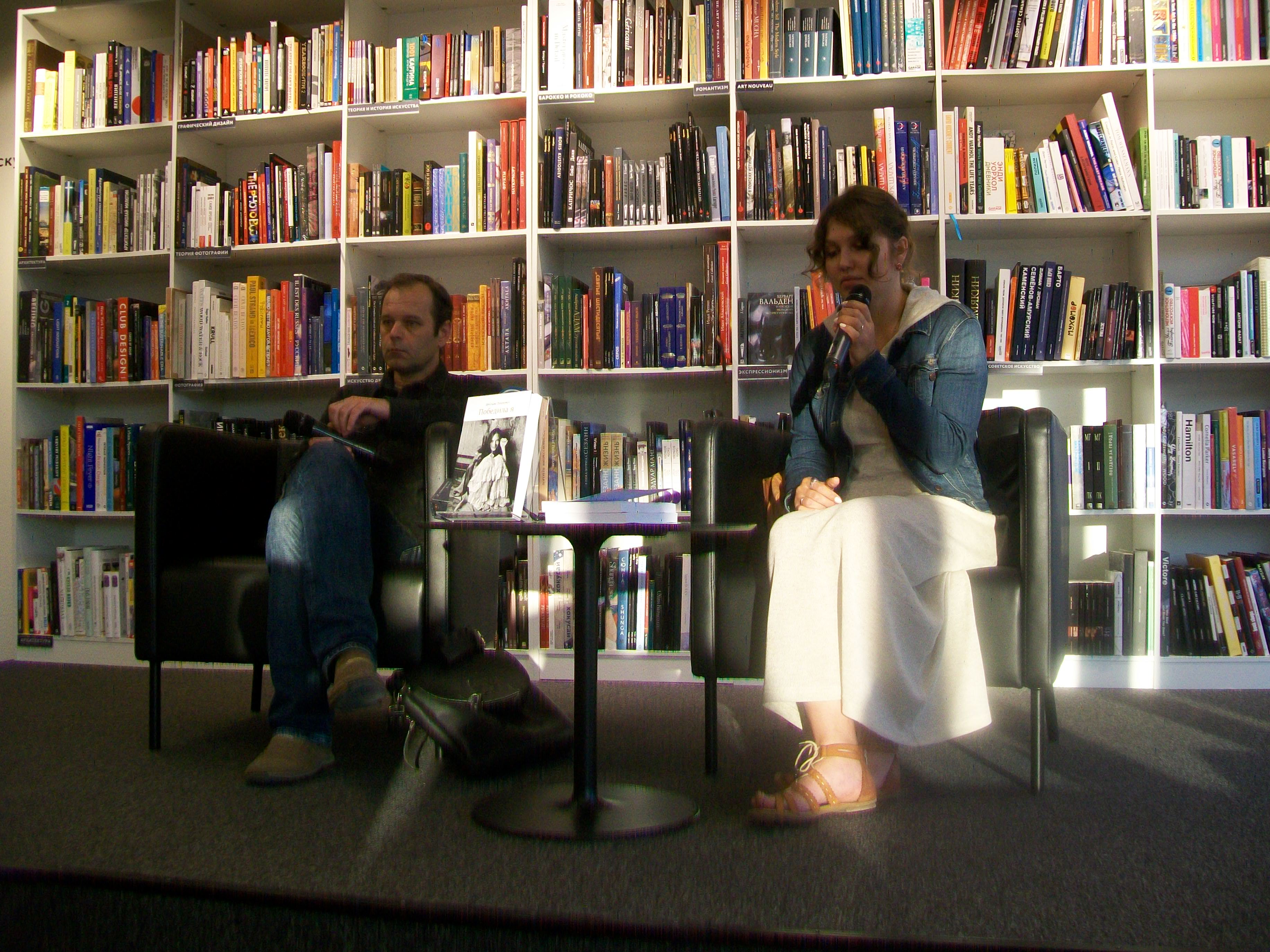 Ярослава Пулинович с мужем